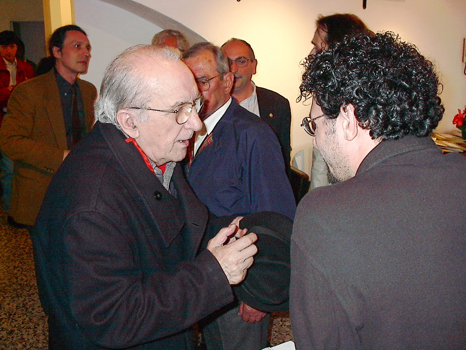 sommariva e don gallo